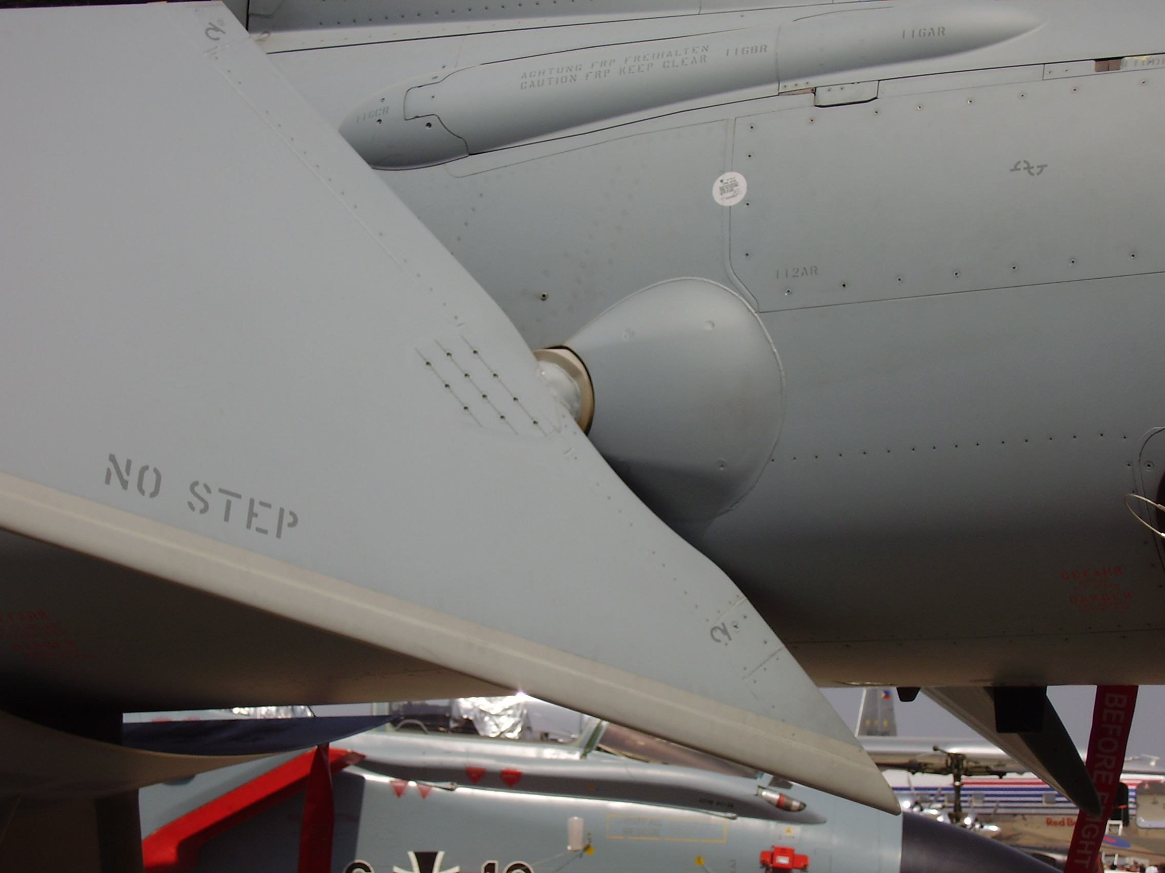 ILA 2008, registration 30+12